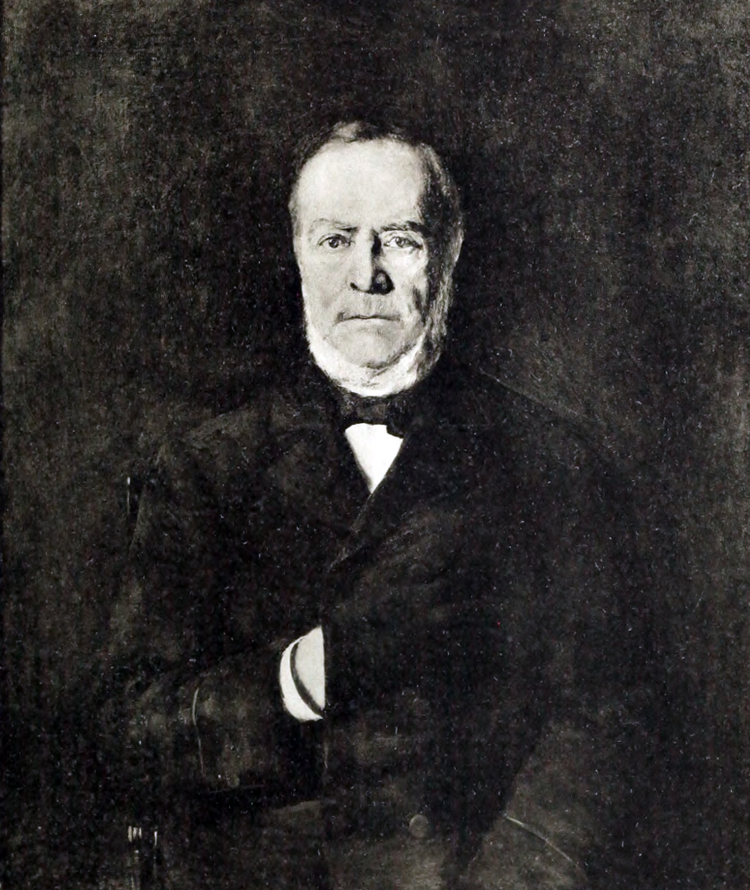 Gustaf Böttiger (1817-1887)